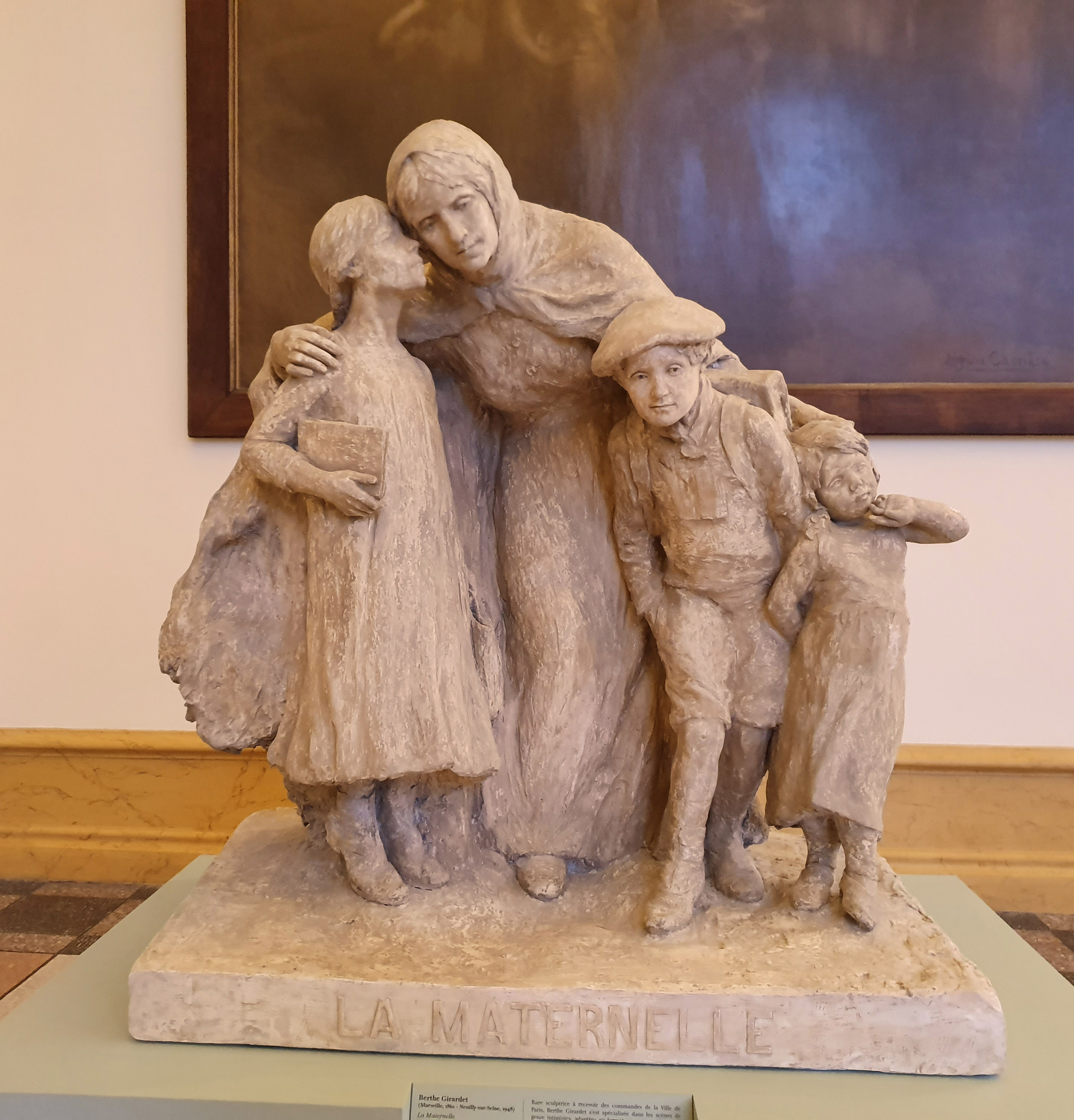 Berthe Girardet, La maternelle, 1908, Modèle en platre, Petit Palais, Paris